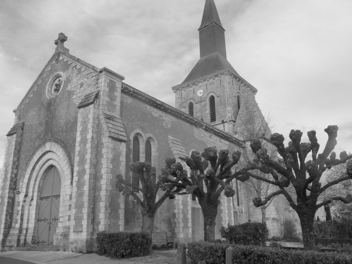 Eglise de Saint-Valérien, Vendée